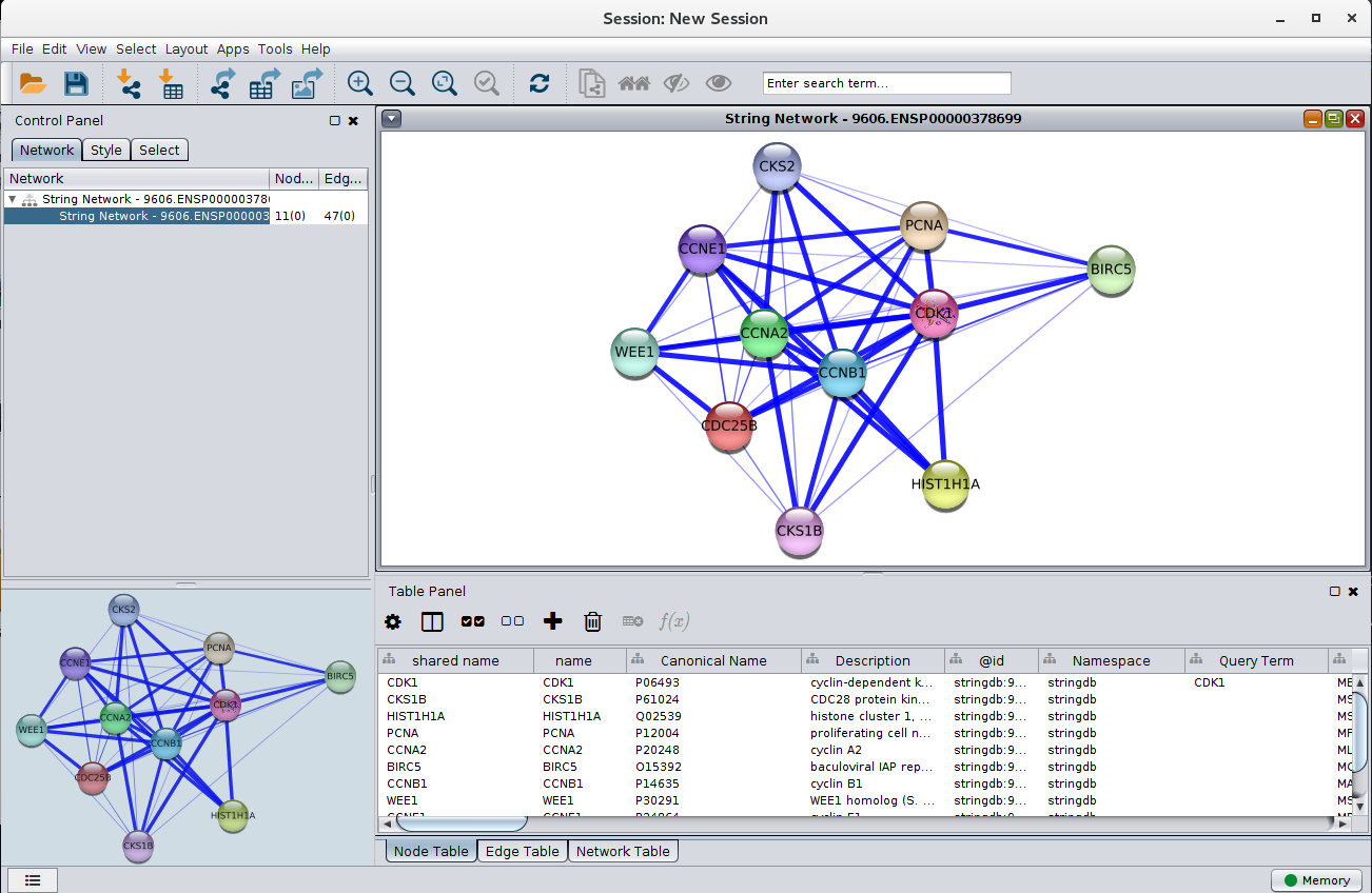 String Network in Cytoscape